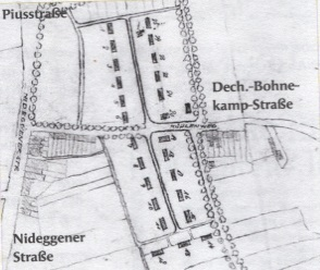 Plan der Schweizer Siedlung in Düren